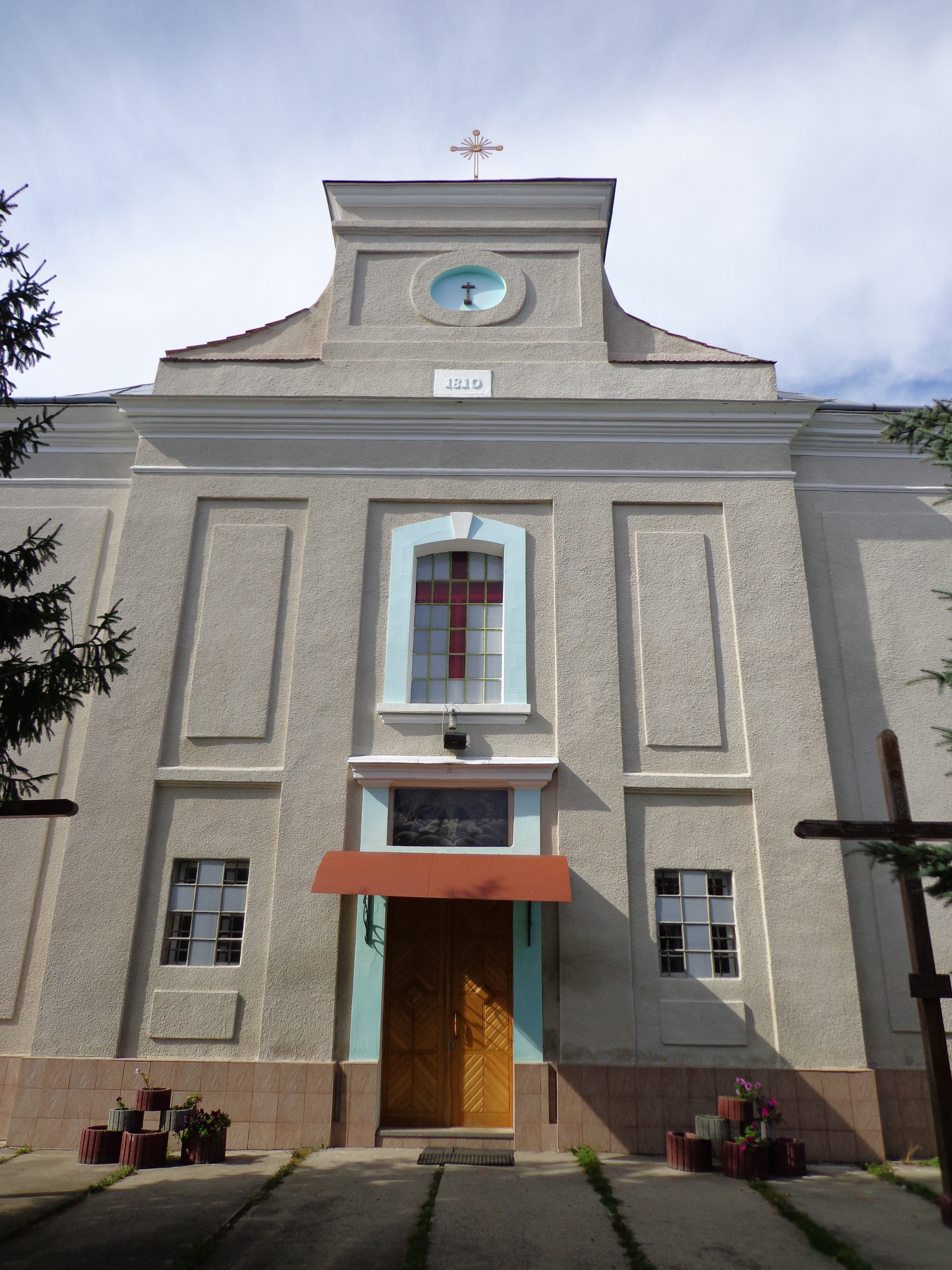 Костел Св. Анни (мур.), Жовтневе